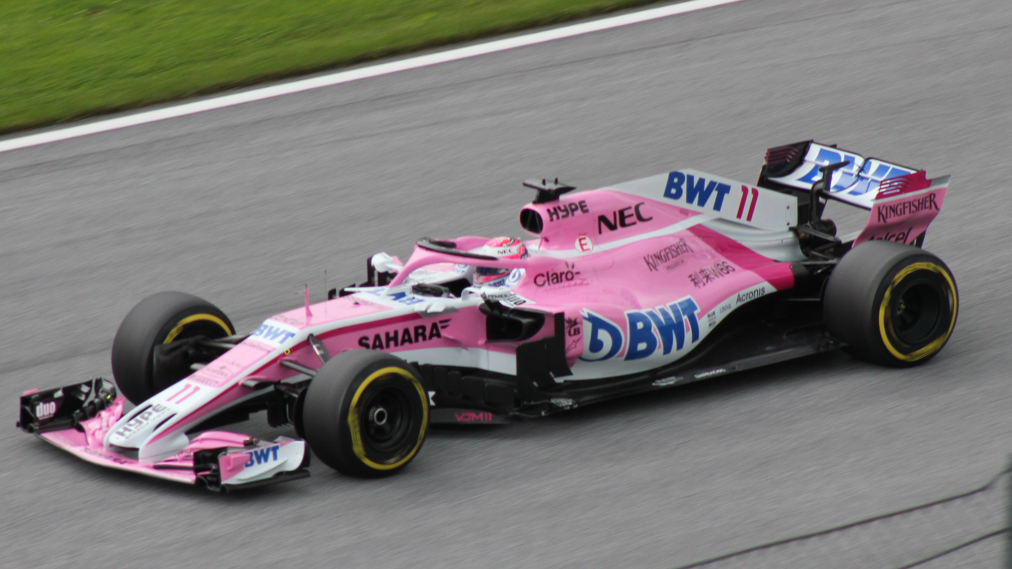 11 Perez beim Rennwochenende in Österreich 2018